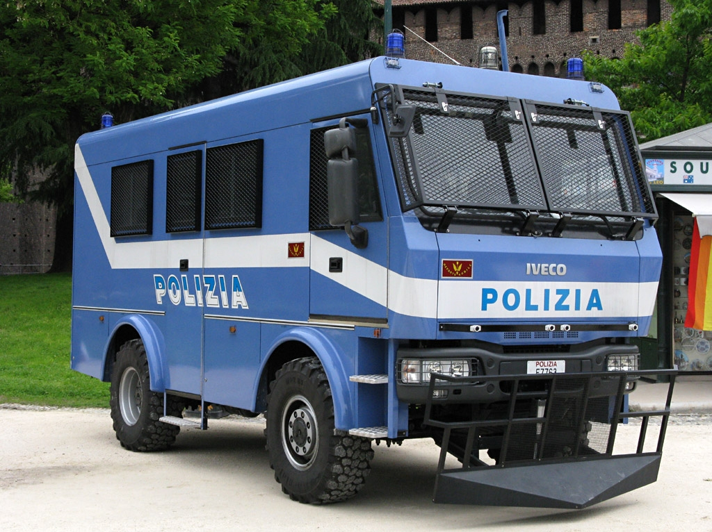 Un Iveco Eurocargo della 2a serie allestito per il reparto mobile della Polizia di Stato, dotato di trazione integrale (vista anteriore).